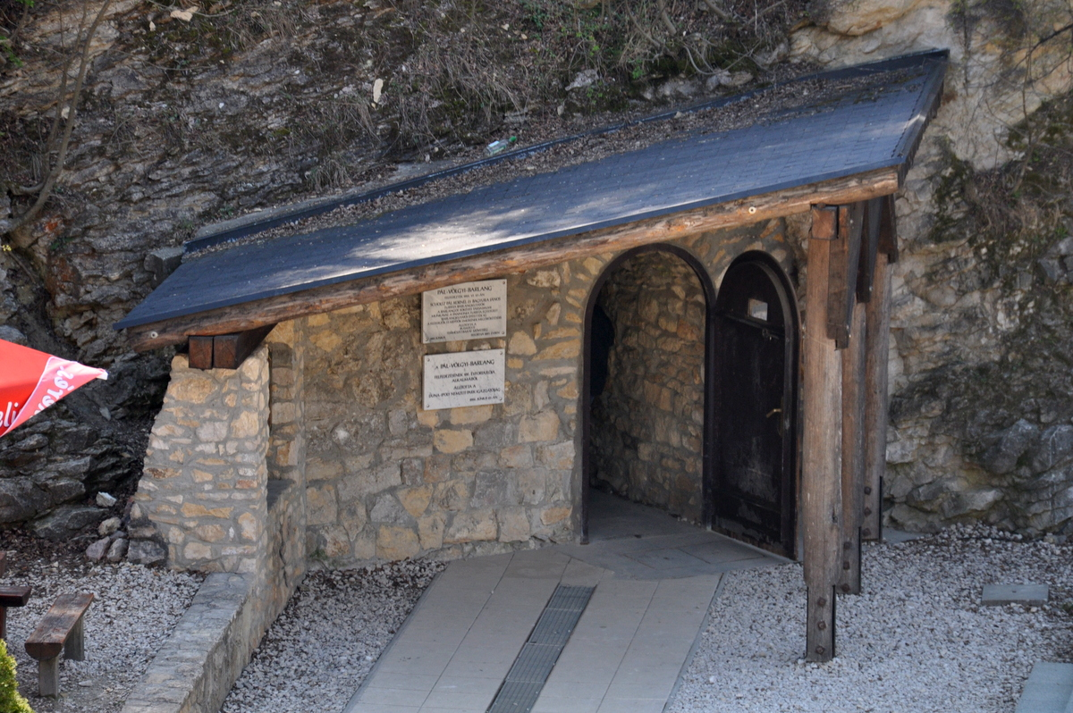 Pál-völgy Cave, Budapest, Hungary